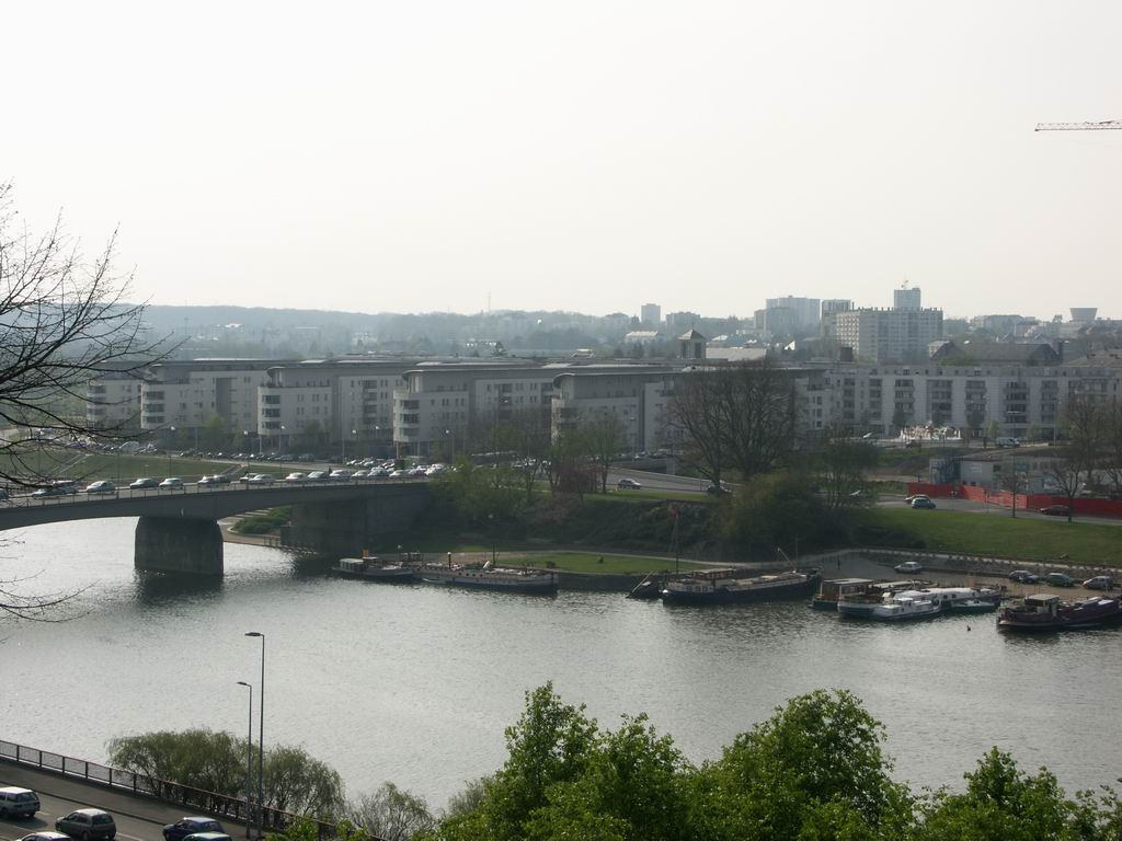 Stadtteil Front de Maine {LöschantragBild} keine Lizenz -- Crux ふ 17:13, 6. Aug 2005 (CEST) Hi Cruz !!! Danke für den Hinweis auf die Lizenz. Das ist ein eigenes Bild. Soll ich drunterschreiben "aufgenommen von mir" ? Danke für deine Hilfe. --Tany 13:54:45, 8. Aug 2005 (CEST) Hab' das Bild jetzt wieder eingefügt mit Hinweis auf "Eigene Aufnahme". Ist das so besser ? Darf ich's jetzt wieder benutzen ? --Tany 14:14:15, 8. Aug 2005 (CEST) Da selbst aufgenommen, denke ich, dass ich GFDL druntersetzen kann. --Leipnizkeks 22:35, 19. Aug 2005 (CEST)